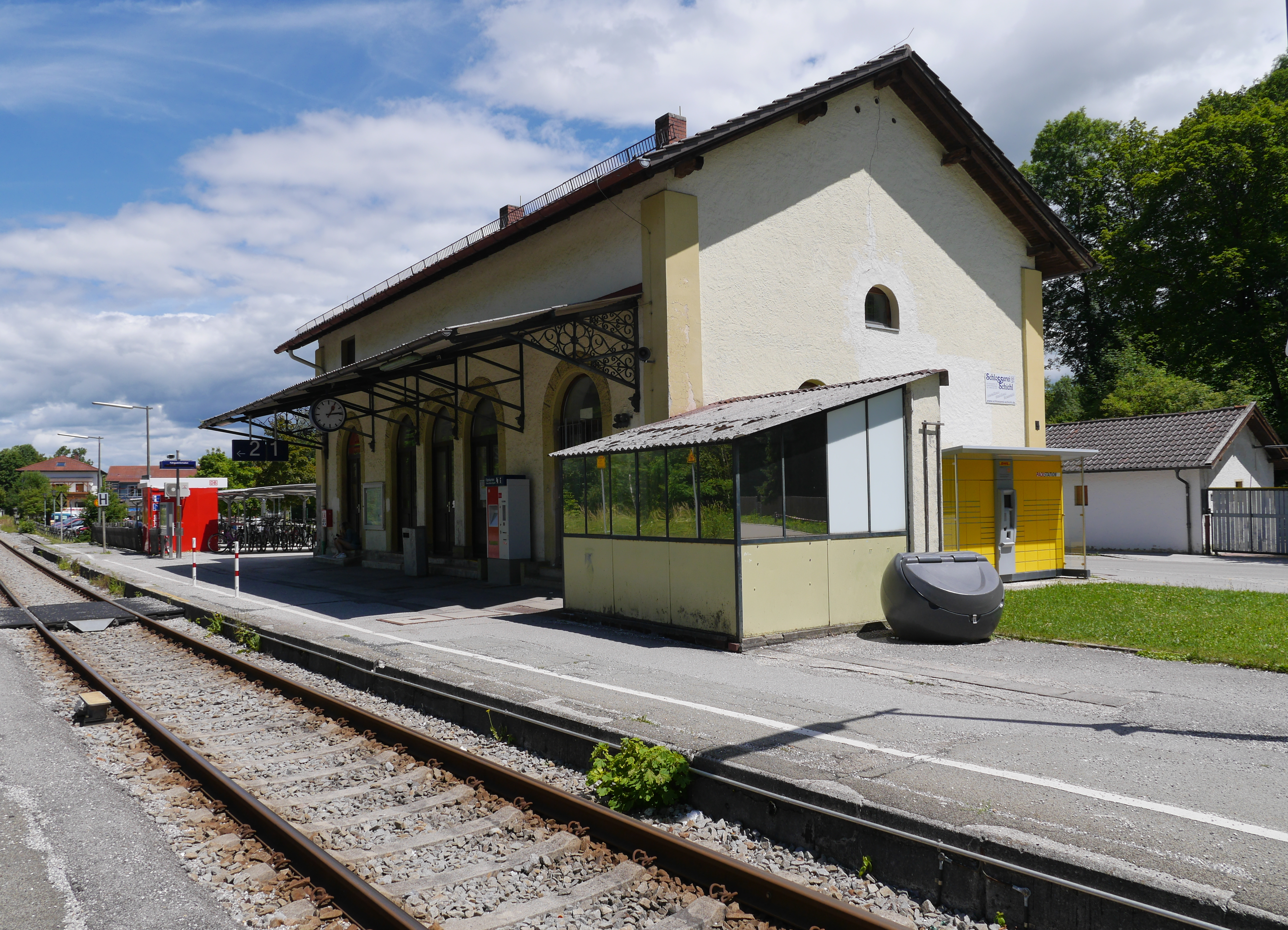 Empfangsgebäude des Bahnhofs Peißenberg von der Gleisseite, im Hintergrund links das Video-Reisezentrum